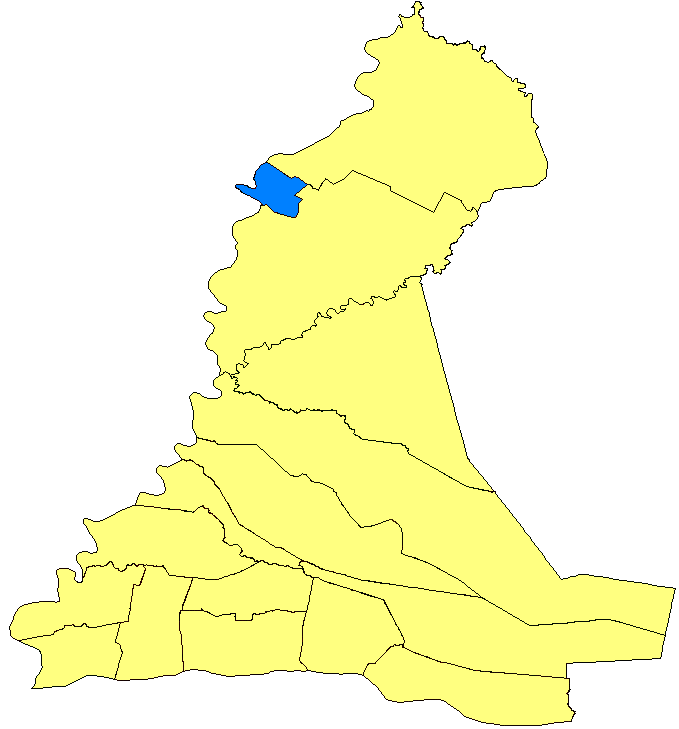 Mapa de Alberdi, Paraguay.